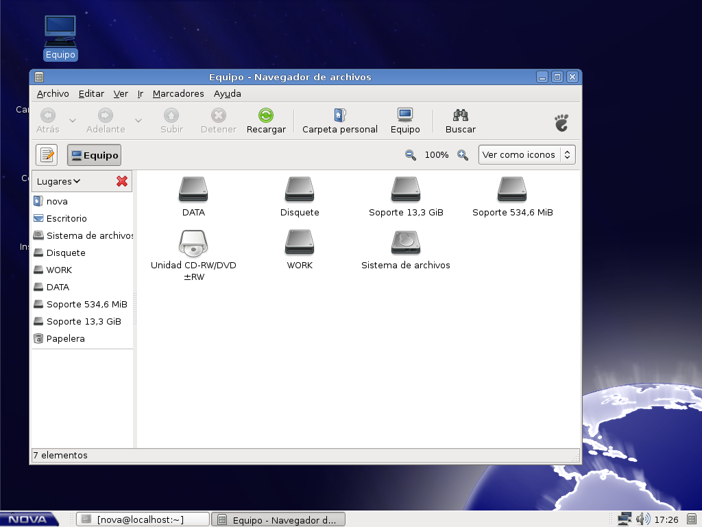 Aplicación Nautilus en Nova 1.1.2 Baire